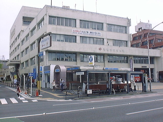 Kōnan-ku Ward Office, Kōnan-ku, Yokohama, Kanagawa, Japan (港南区役所)